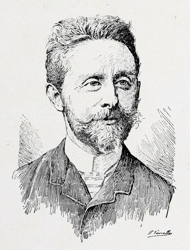 Ritratto dell'Arch. Angelo Santonè (1852-1908) di Pietro Vassallo (1908) da L'Architettura Italiana (ottobre 1908)